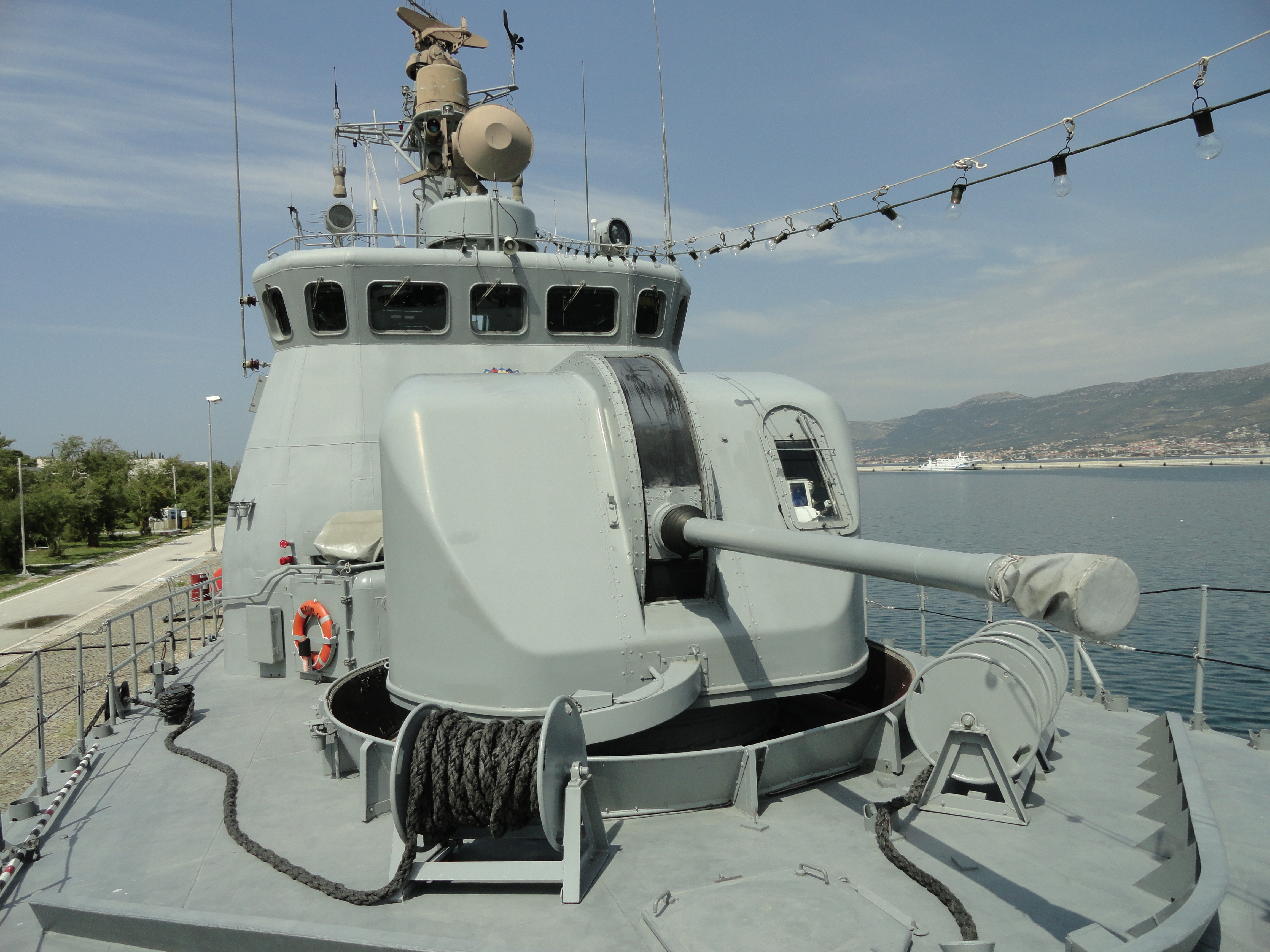 RTOP-41 Vukovar u Lori.